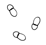 Askosporoj de Venturia inaequalis